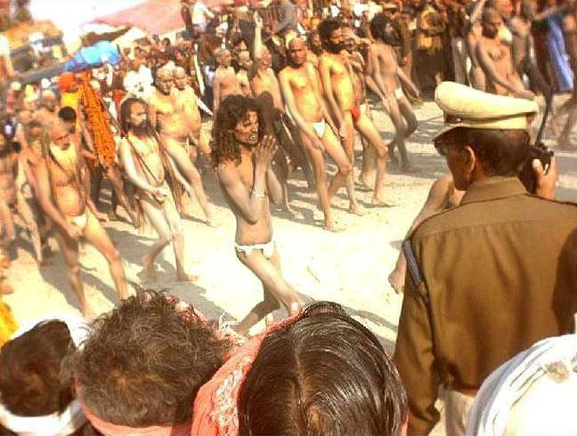 by Hanumandas - Naga Babas returning from bath,Kumbha Mela Allahabad, 24th January 2001